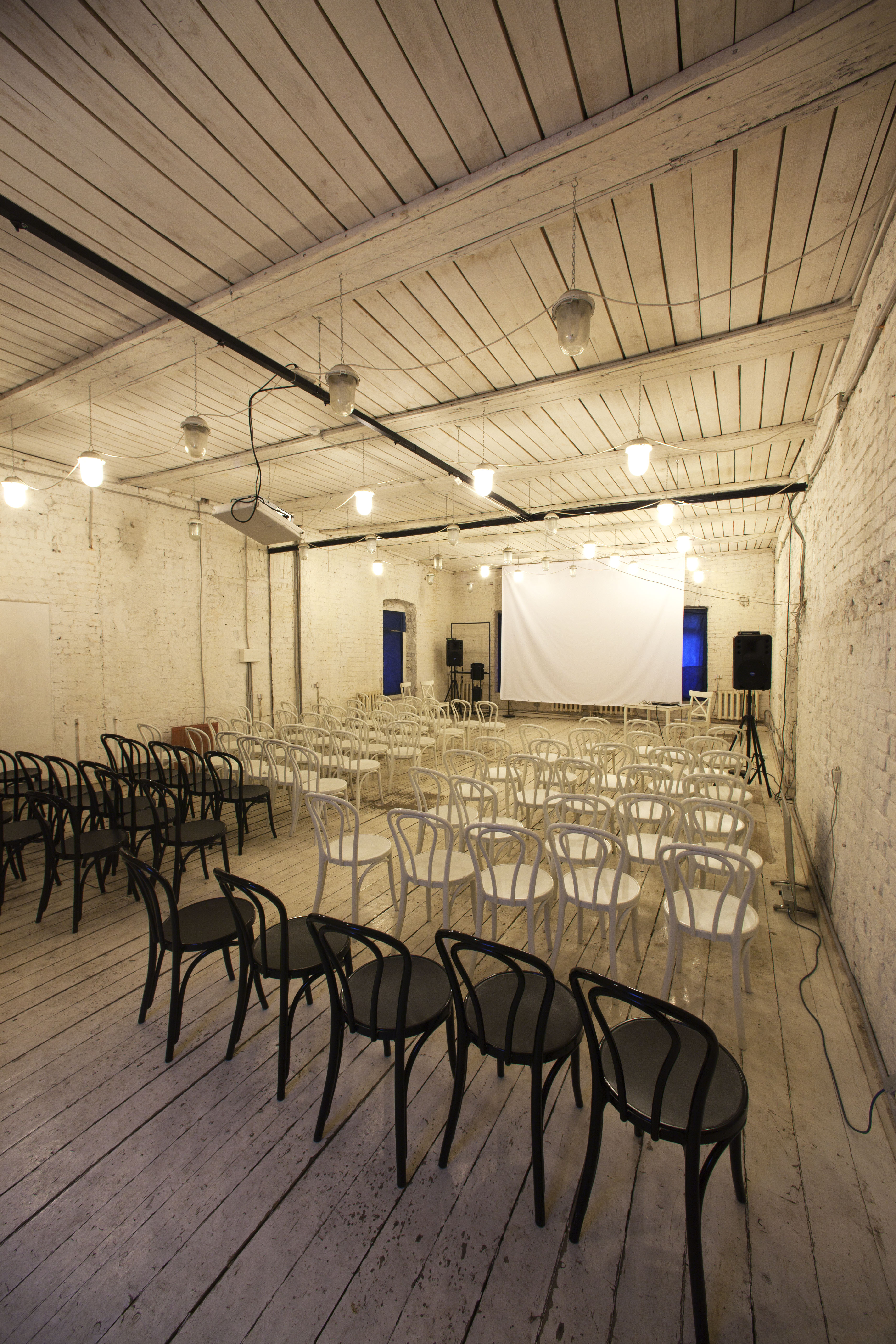 Лекторий музея архитектуры имени А.В.Щусева.